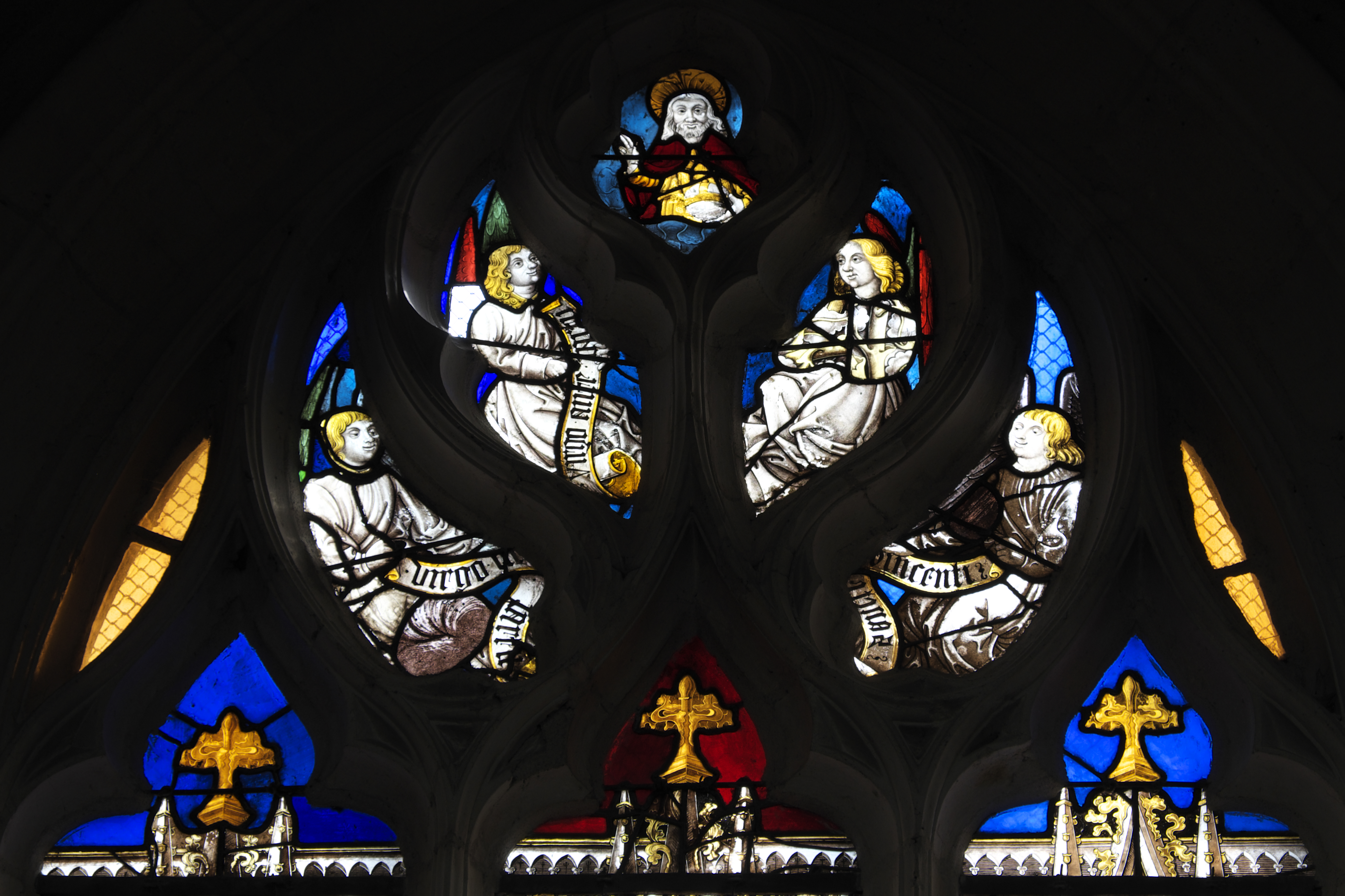 Bleiglasfenster (Baie 18) in der Basilika Saint-Nicolas in Saint-Nicolas-de-Port im Département Meurthe-et-Moselle (Lothringen/Frankreich), mit Fragmenten aus der Zeit um 1510—1520 von Jacot de Toul; Darstellung: Gottvater und drei Engel mit Spruchbändern (im Maßwerk)